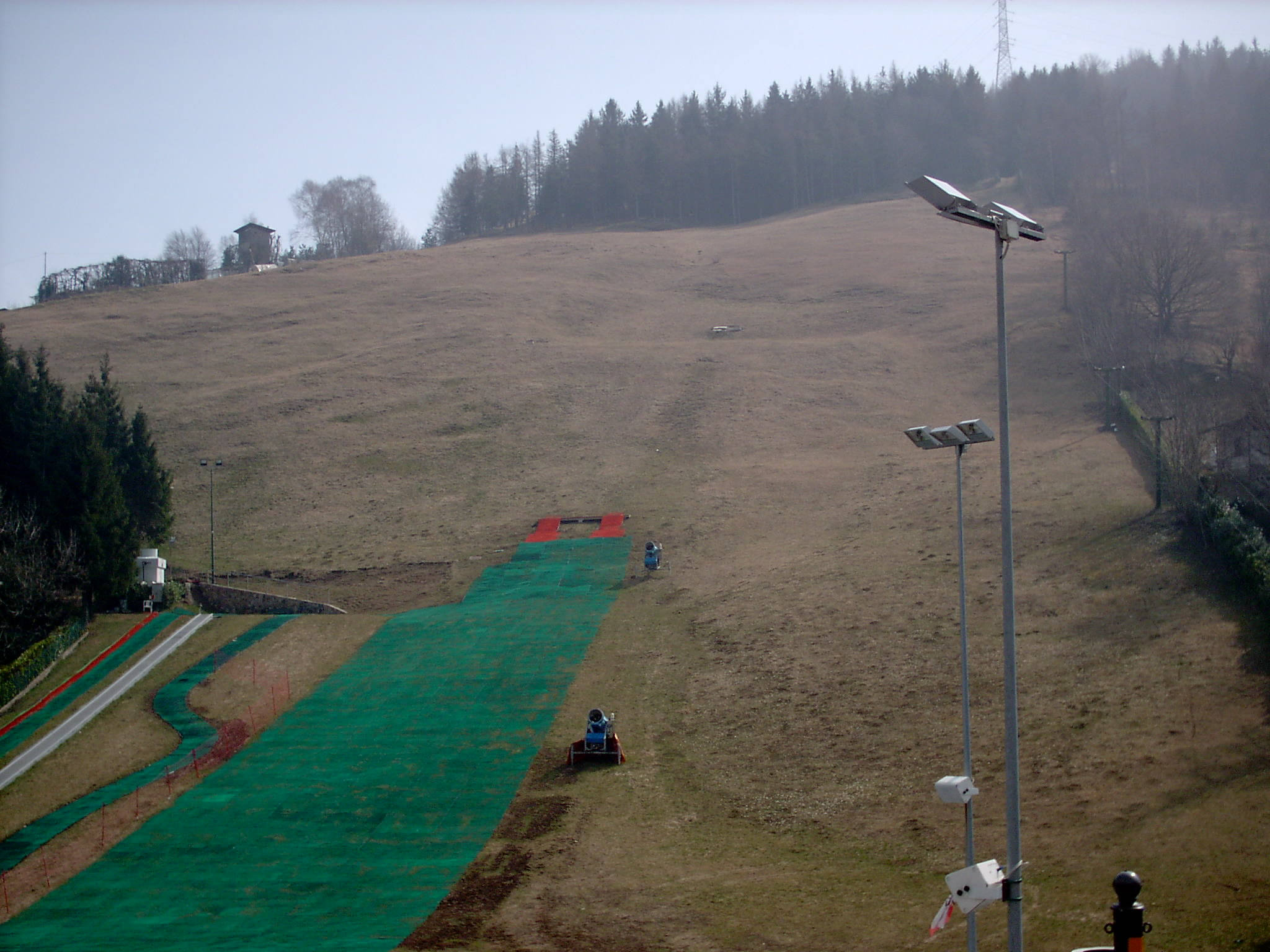 Selvino, Bergamo, Italia